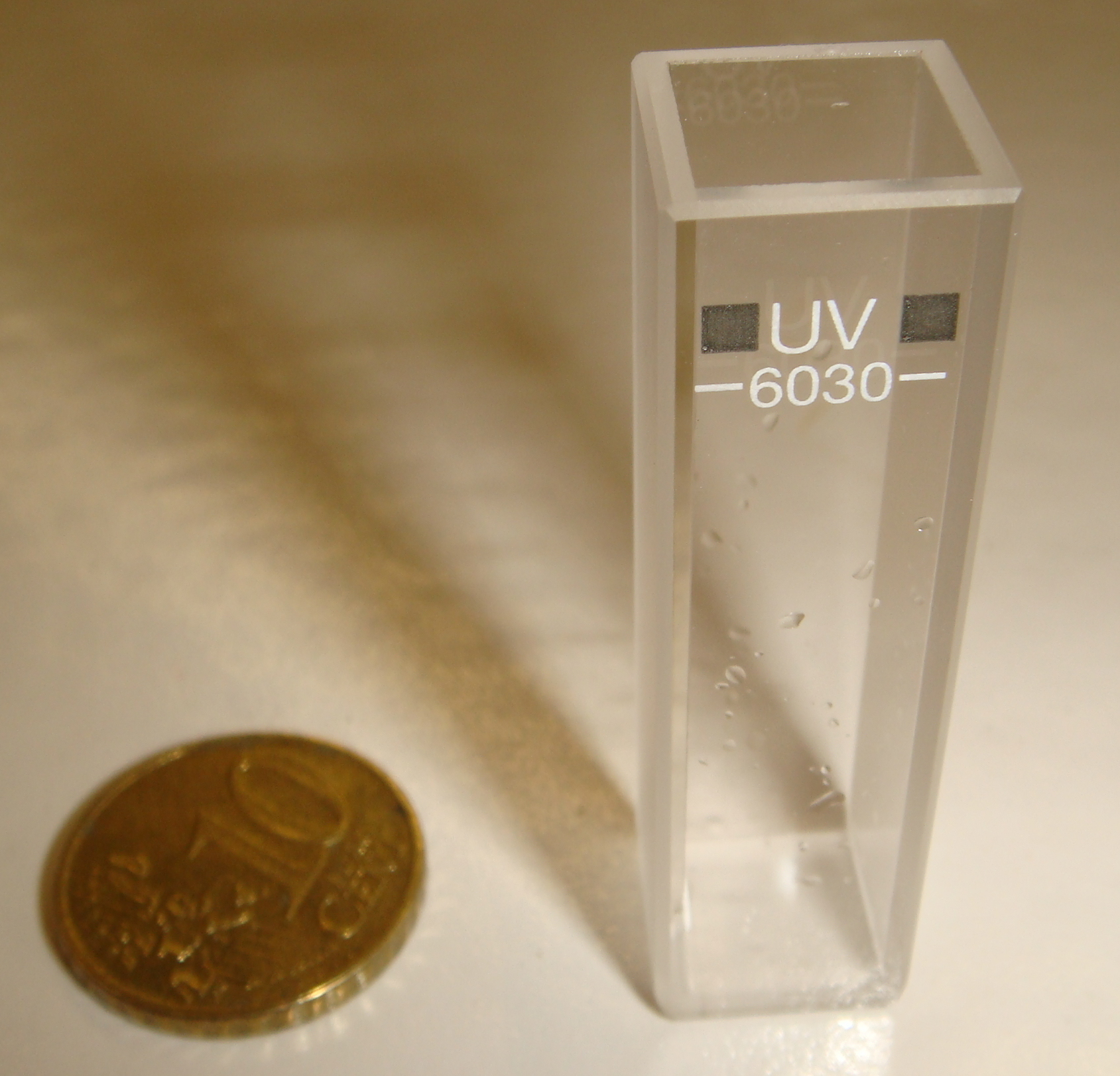 Küvette für ein Photometer mit 10-Eurocent Münze zum Größenvergleich.